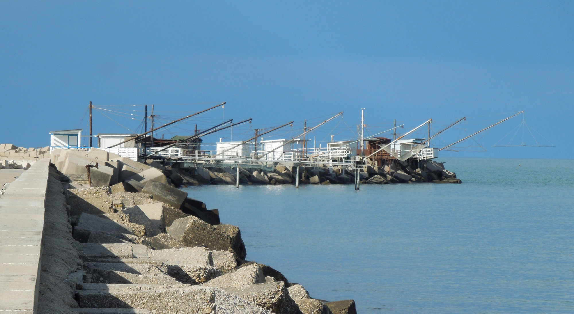 Trabocchi sull'area portuale di Giulianova in provincia di Teramo, Abruzzo.